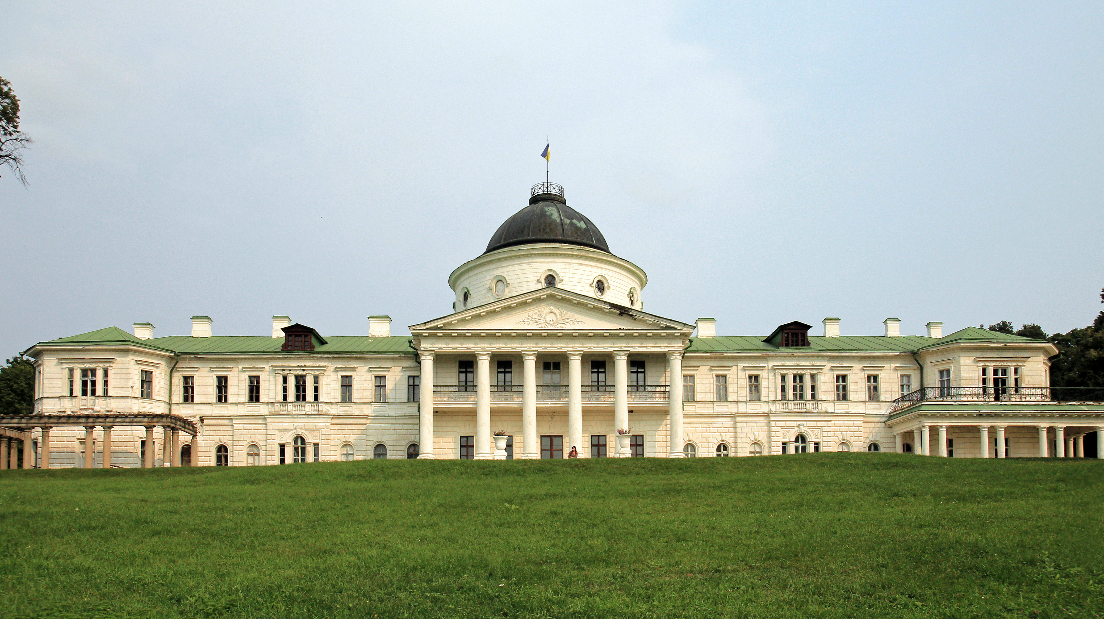 Комплекс споруд садиби "Качанiвка"